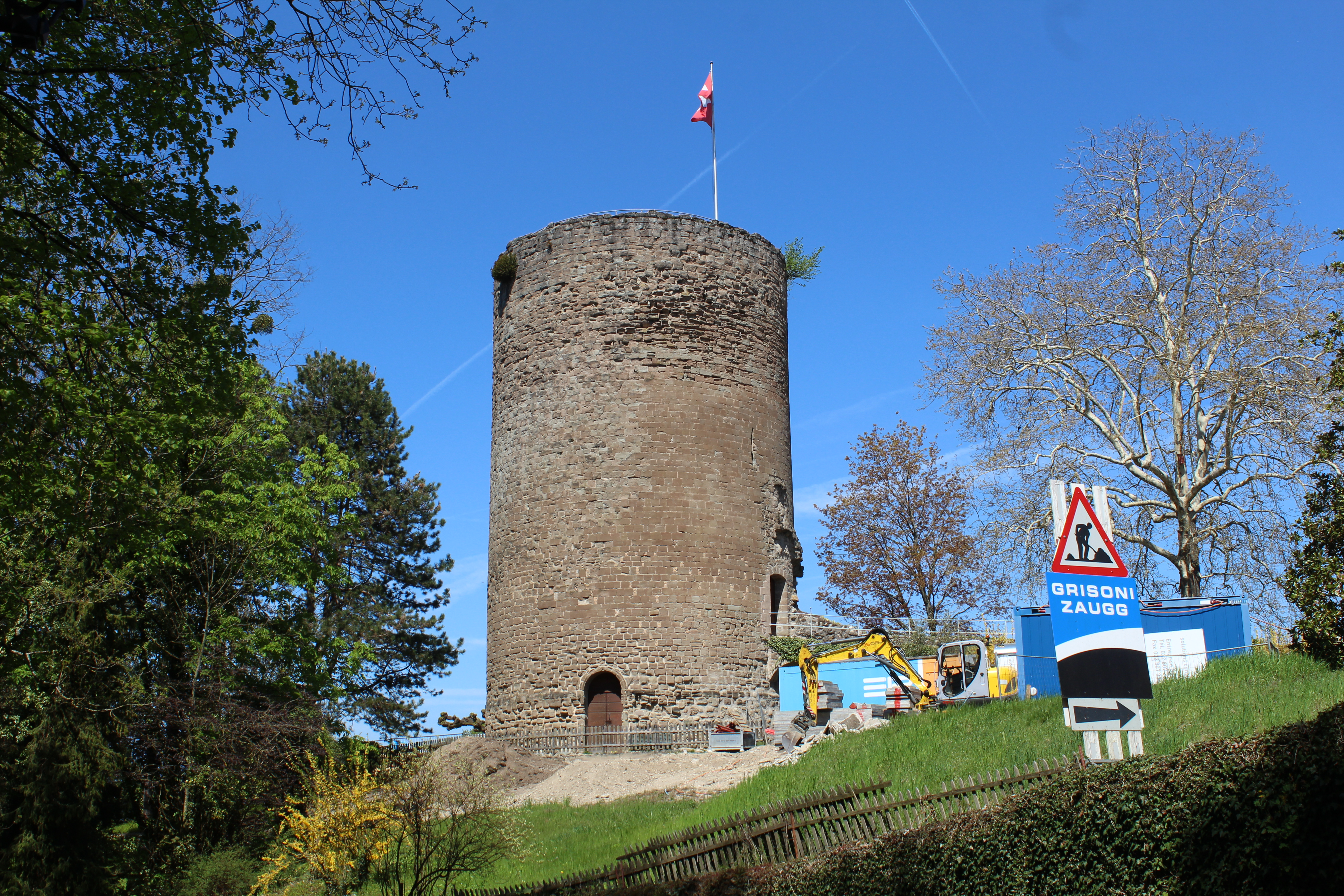 Tour d'Hermance.